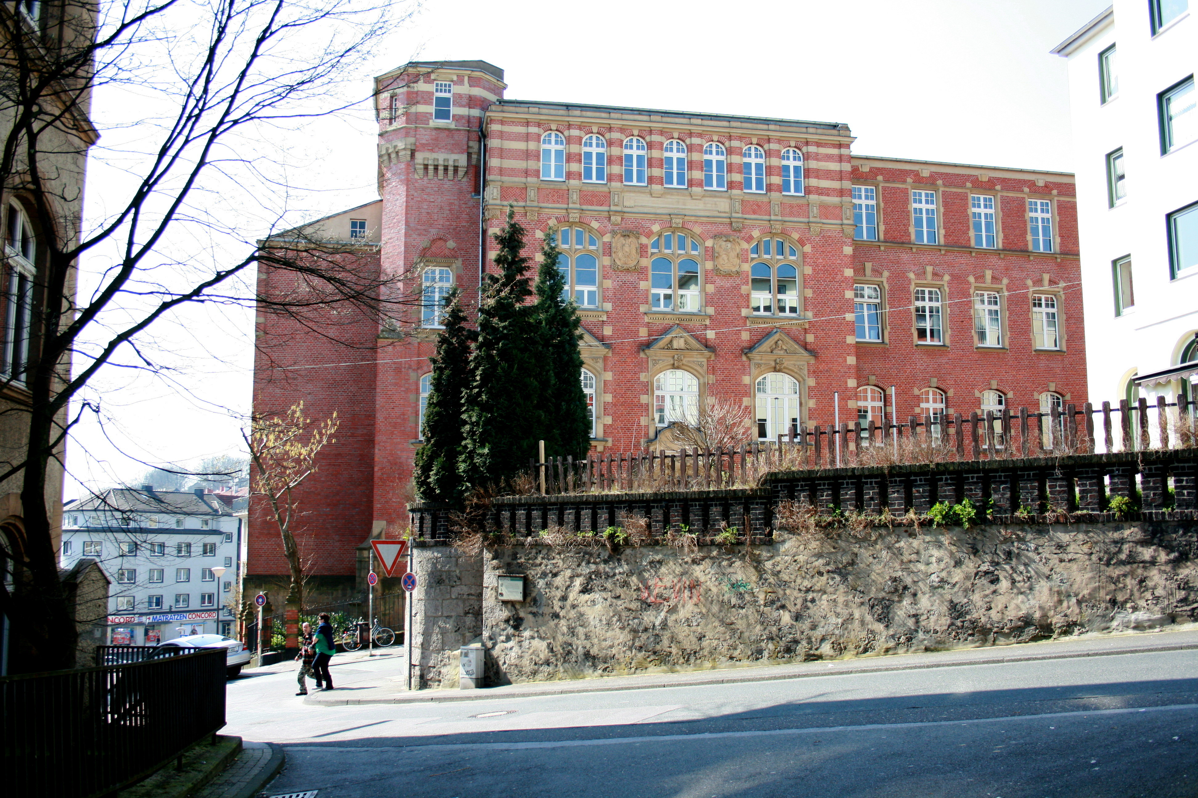 Hochschule für Musik Köln Standort Wuppertal